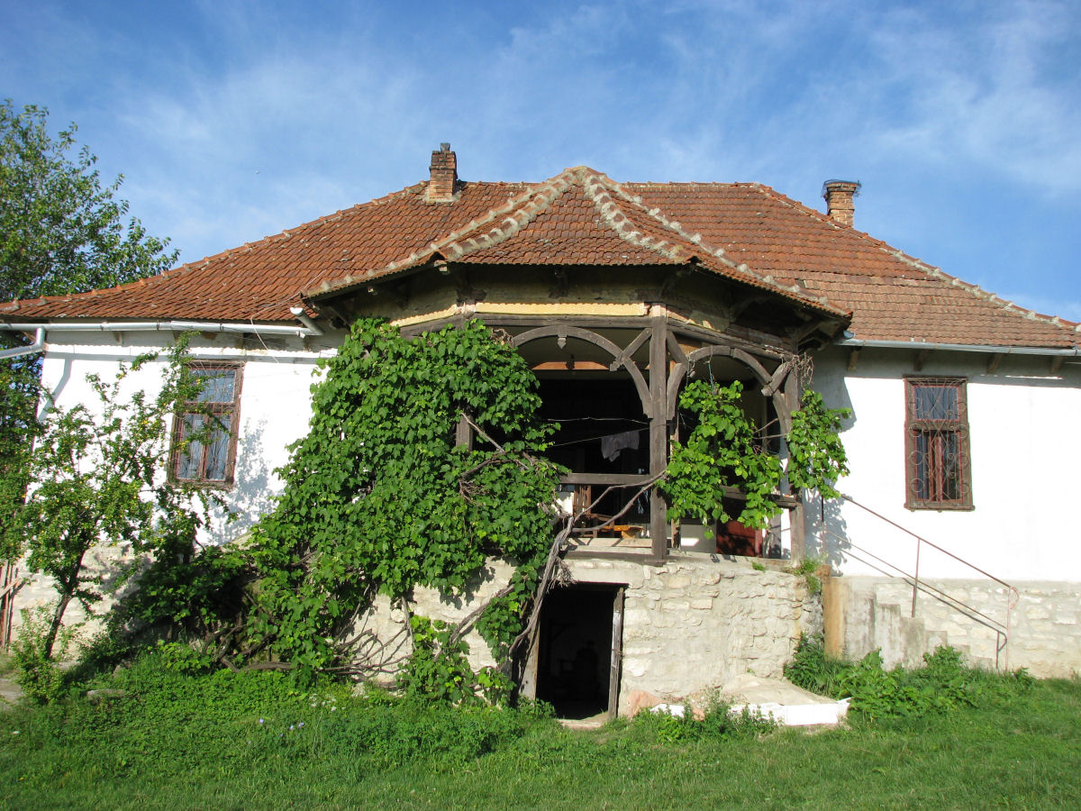 Parohia bisericii unitariene din Sănduleşti, judeţul Cluj